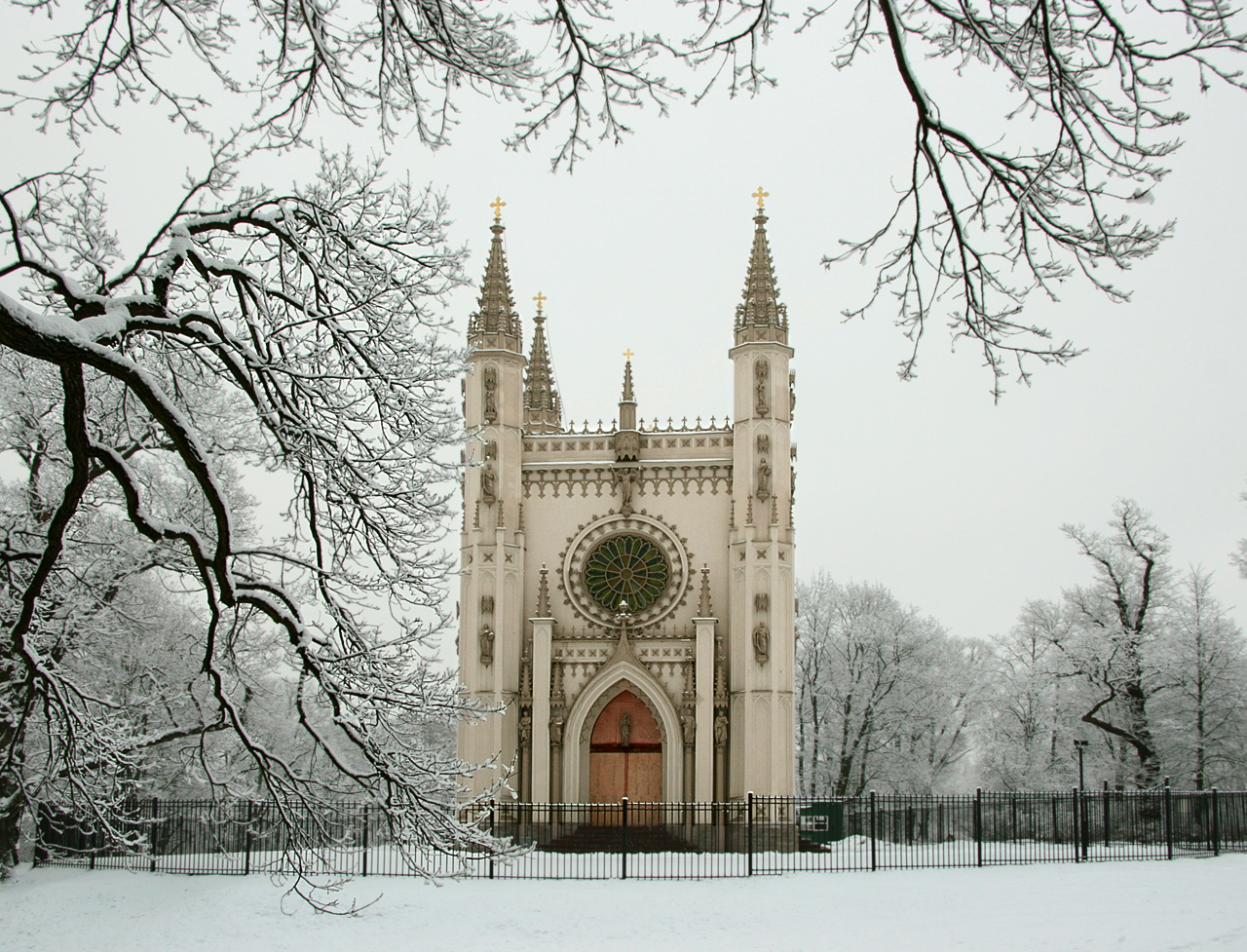 Храм Александра Невского в парке Александрия (Петергоф)